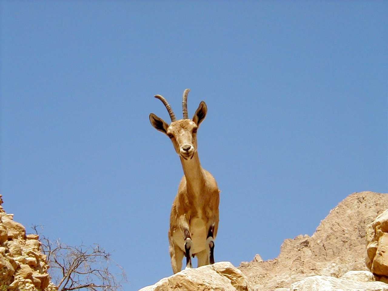 יעל בנחל ערוגות